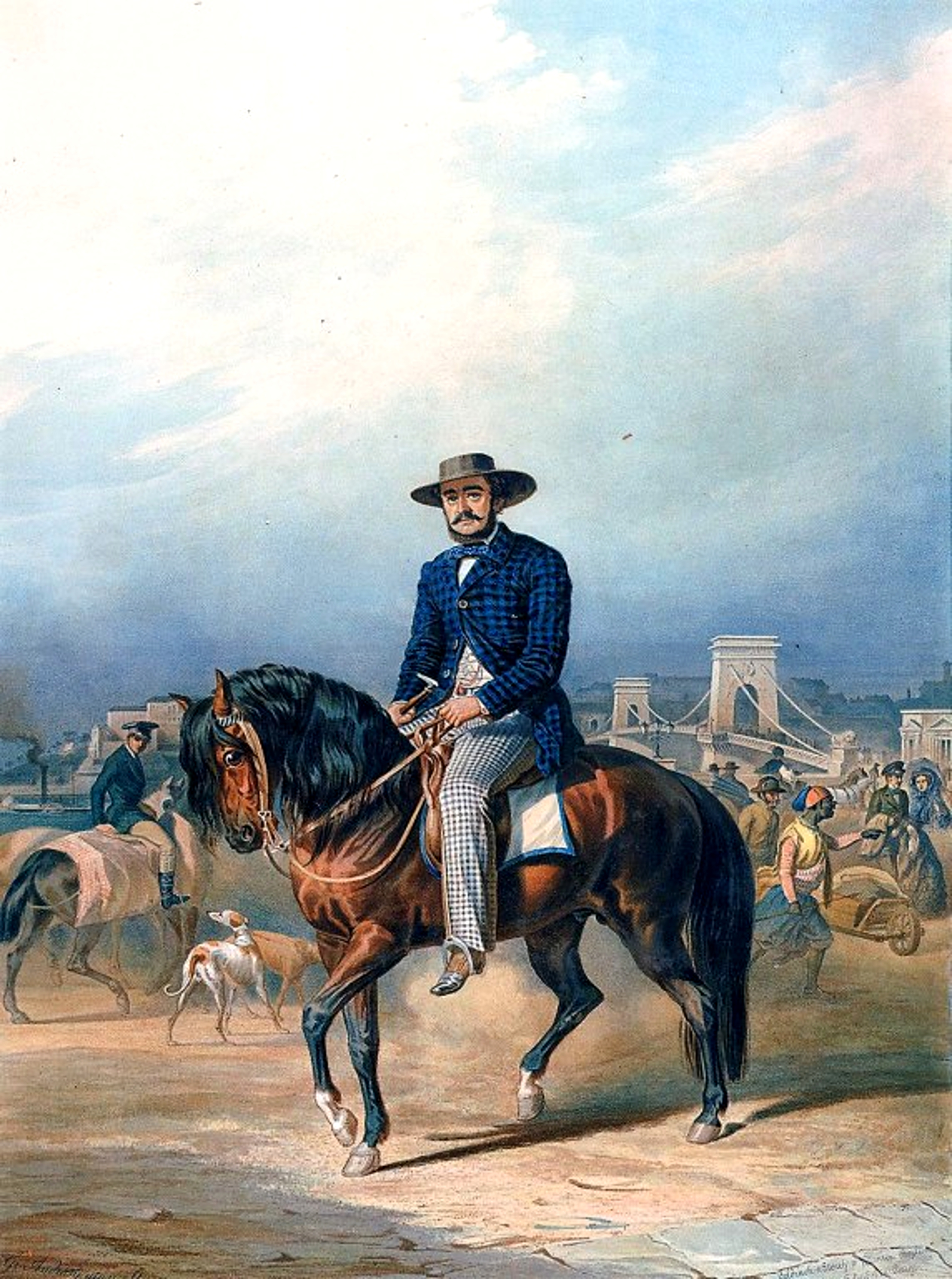 Gróf Széchenyi István. Egykorú olajszínnyomat után. Az eredetit gróf Almássy Manó rajza után Sterio Károly festette. A kép eredetije a Magyar Tudományos Akadémia Széchenyi Múzeumában van. Készült gróf Andrássy Manó nagy díszalbumához: Hazai vadászatok és sport Magyarországon. Pest, 1857.